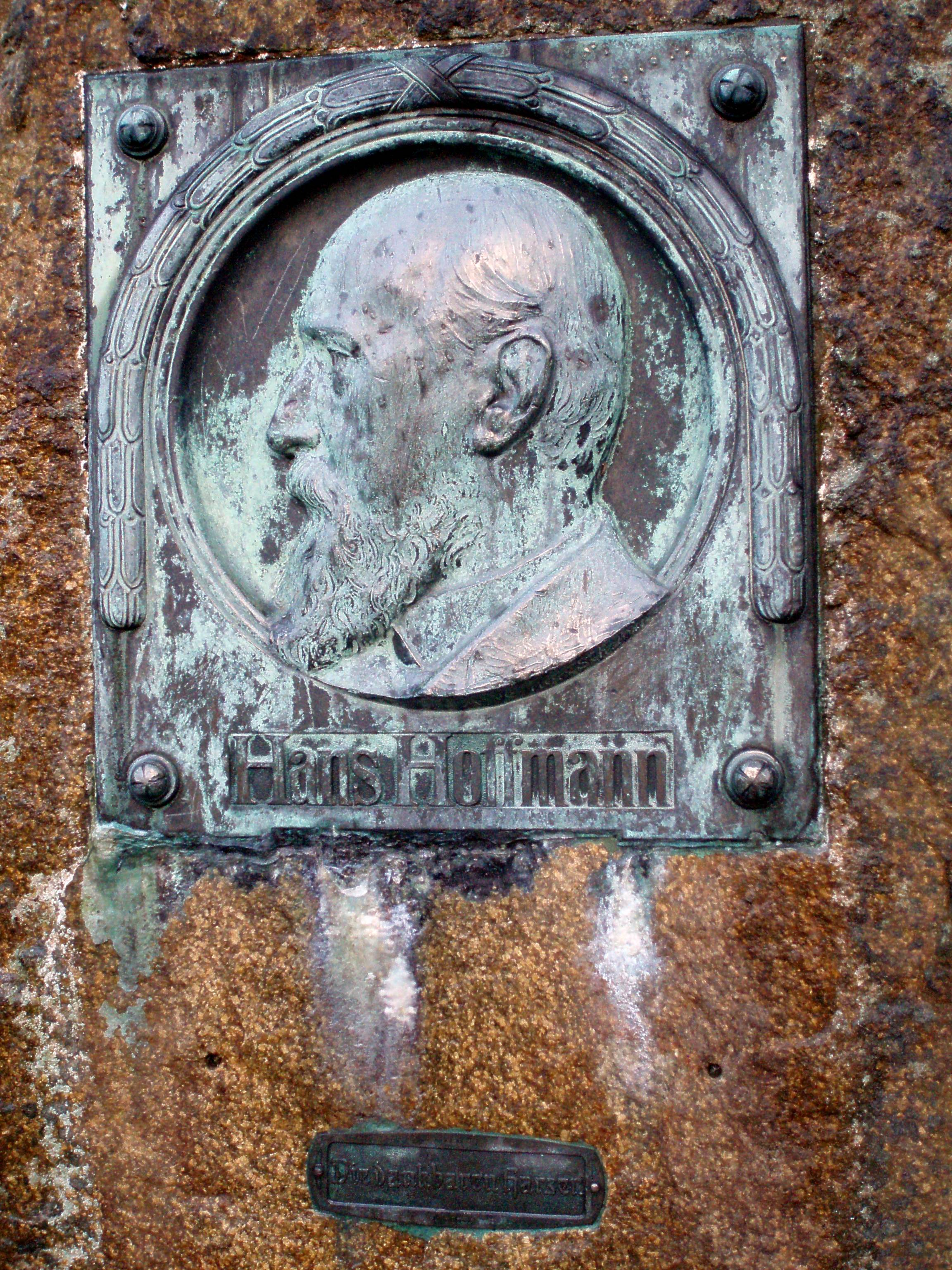 Hans Hoffmann in Wernigerode, Försterplatz